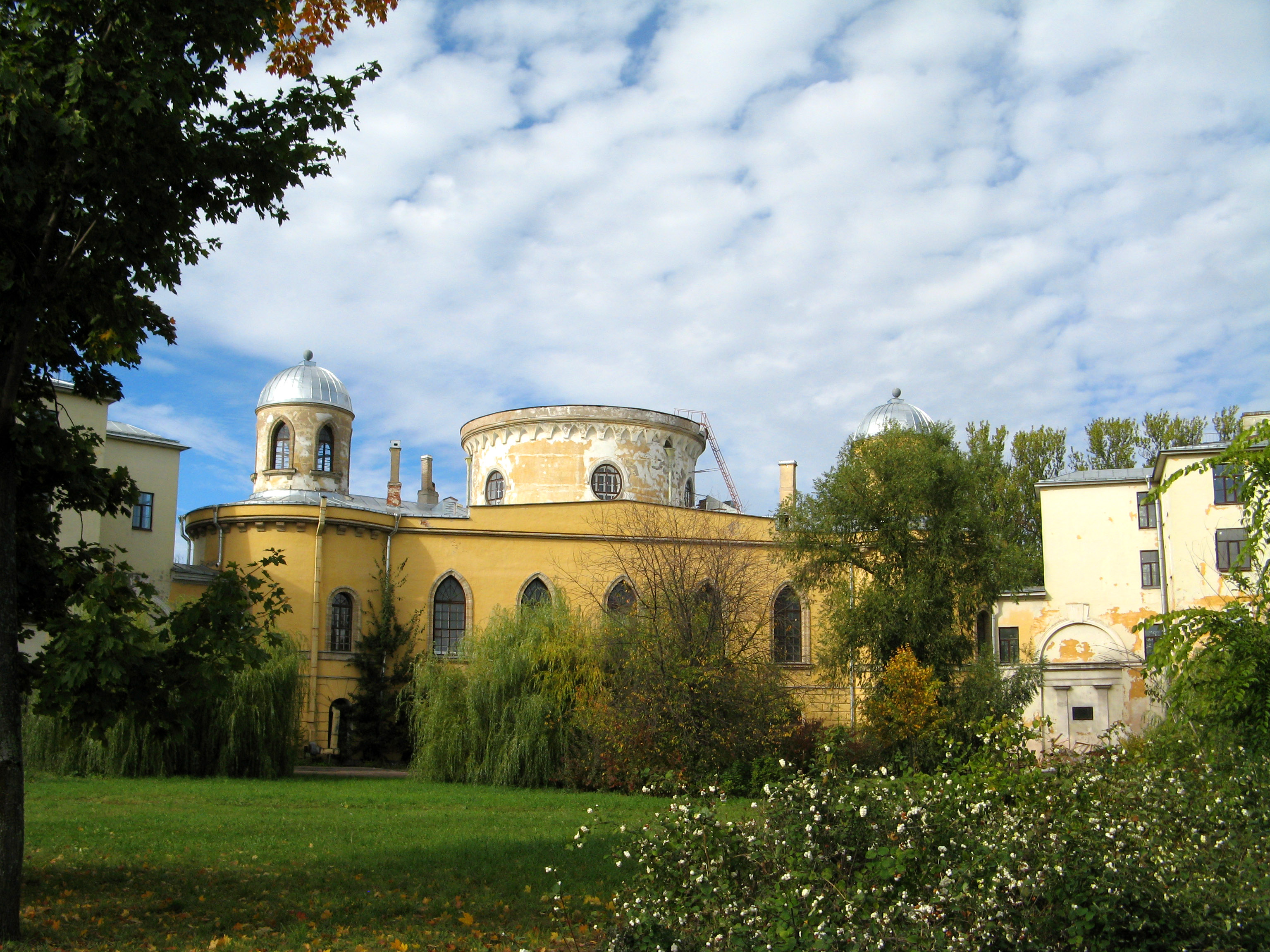 Чесменский дворец с флигелями (Санкт-Петербург, ул. Гастелло, 15). Вид со стороны ул. Ленсовета